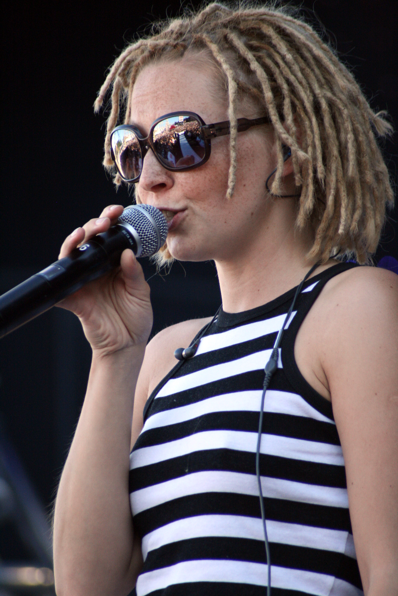 Karolina Kozak, koncert "Hity na czasie” - The Tall Ships' Races, Szczecin 2007